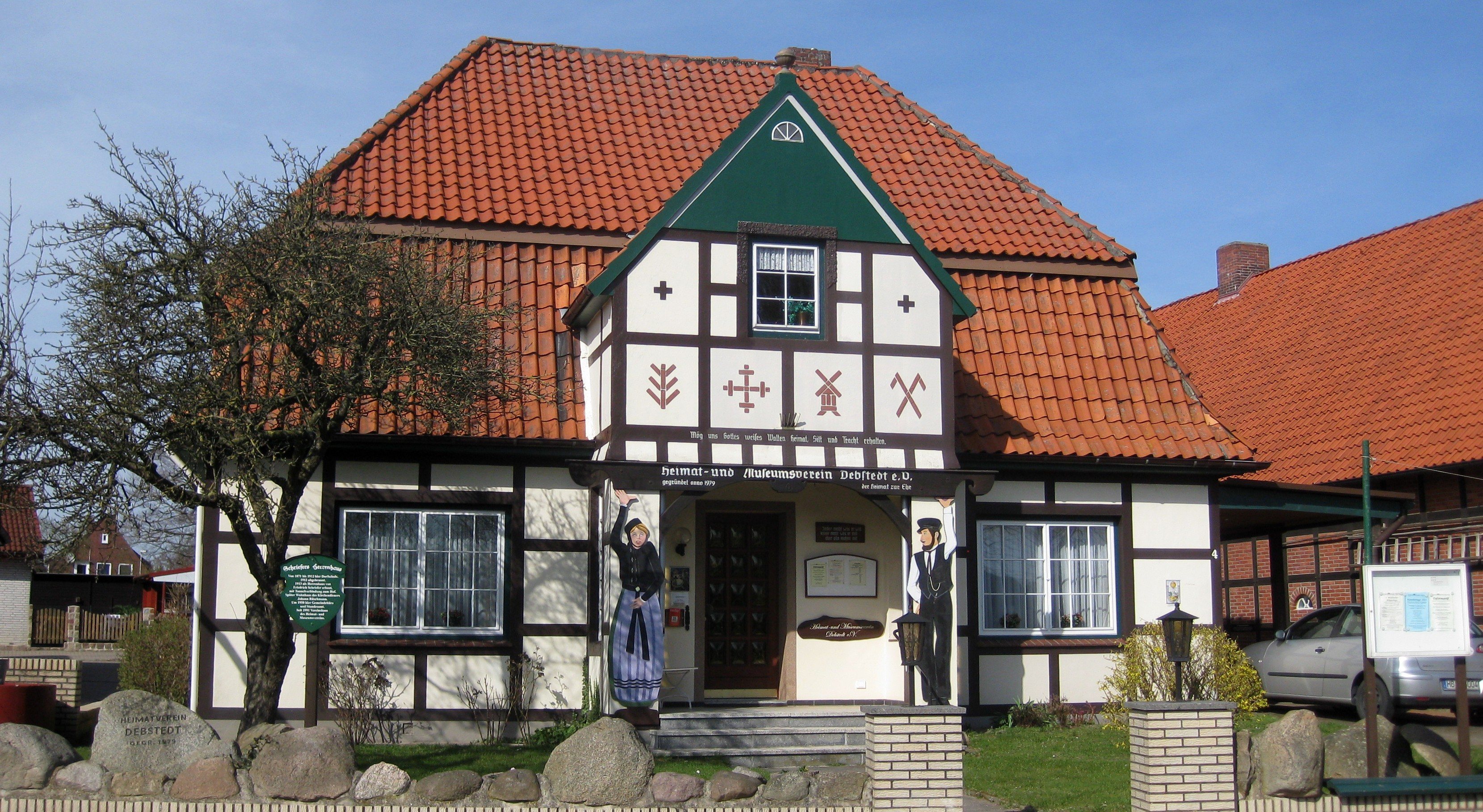 Schriefers Herrenhaus, Versammlungshaus des Heimat- und Museumsvereins Debstedt